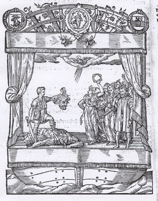 Sommare Beschrijvinghe vande triumphelijcke incomst van den Aerts-hertoge Matthias, binnen die stadt van Brussel 1578: Midtsgaders die figuren ende spectaculen, die inde voorseyde incompste zÿn verthoont gheweest